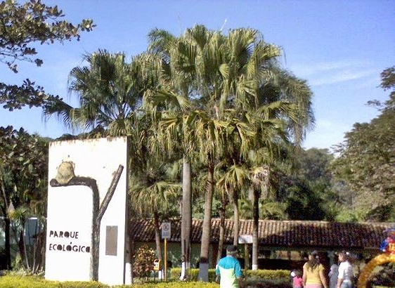 Parque Ecológico de Americana, São Paulo, Brasil